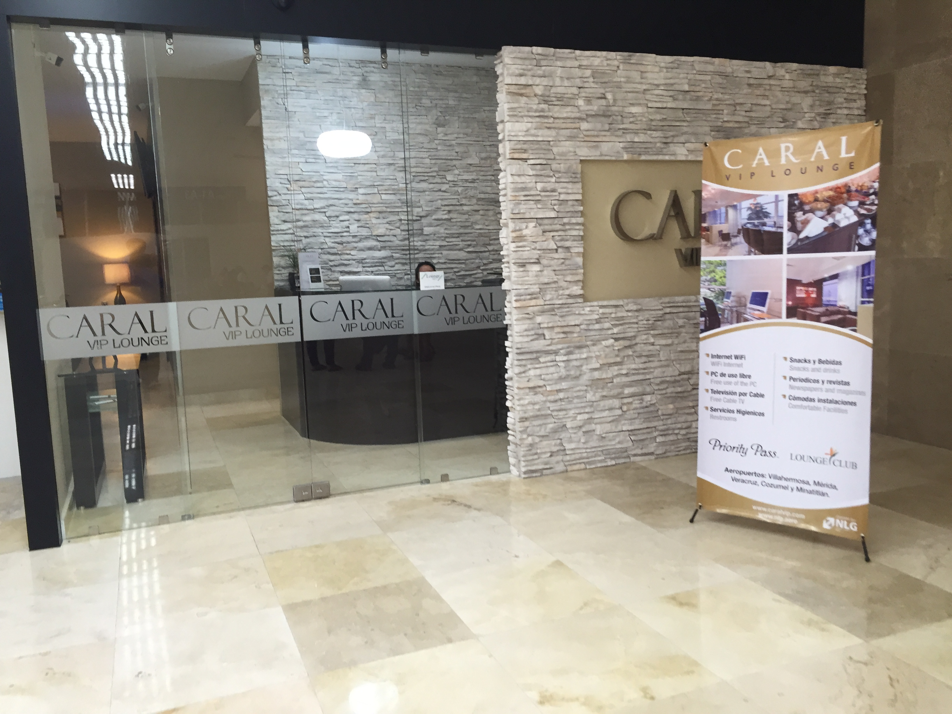 Entrada del Salón VIP Caral del Aeropuerto Internacional de Veracruz.